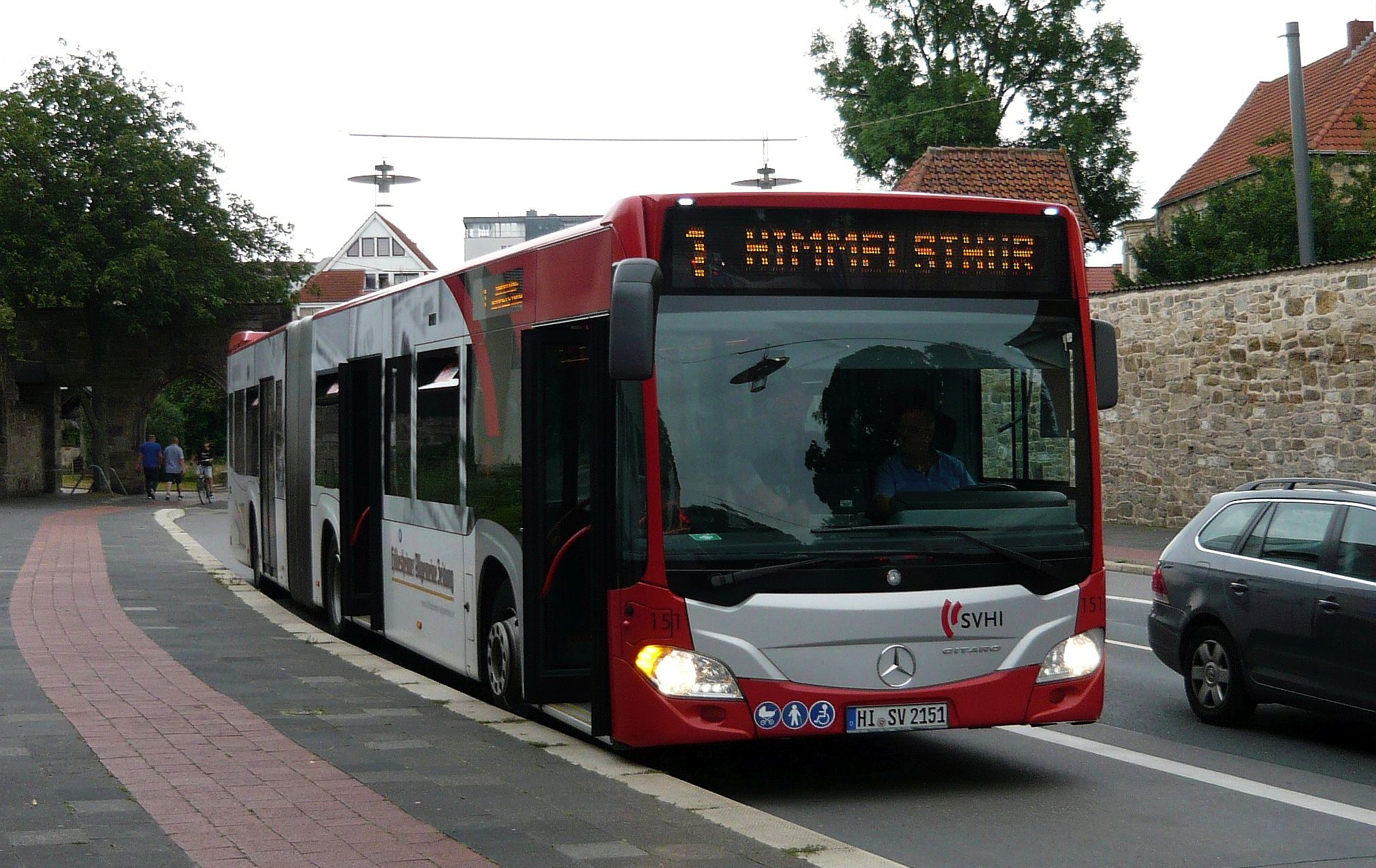 Wagen 151 des Stadtverkehr Hildesheim.